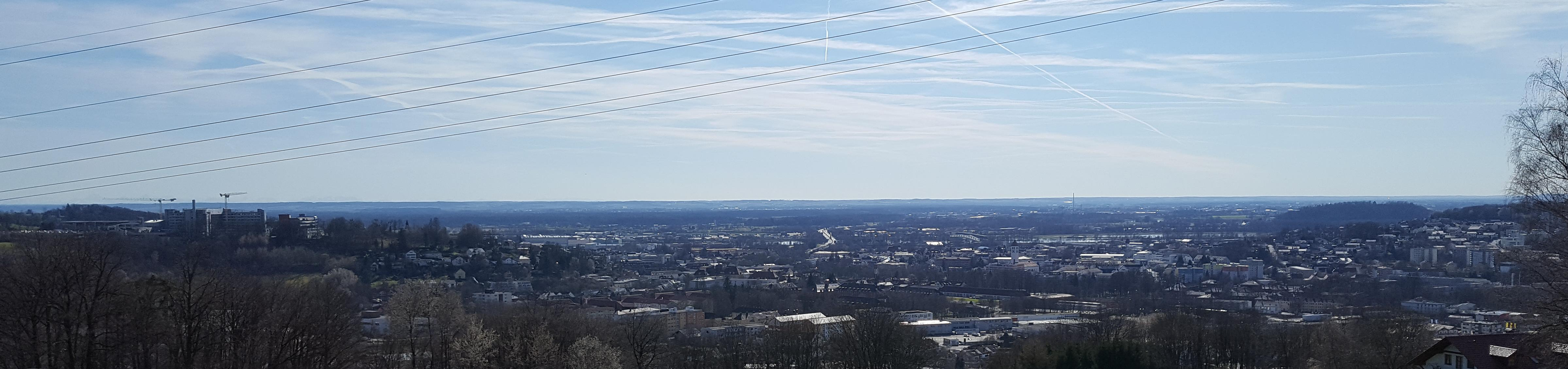 Blick vom Ulrichsberg Richtung Donau auf Teile Deggendorfs